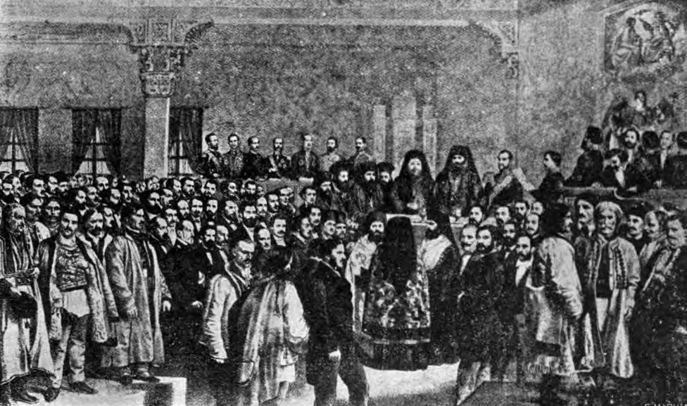 Divanul ad-hoc din București 1857